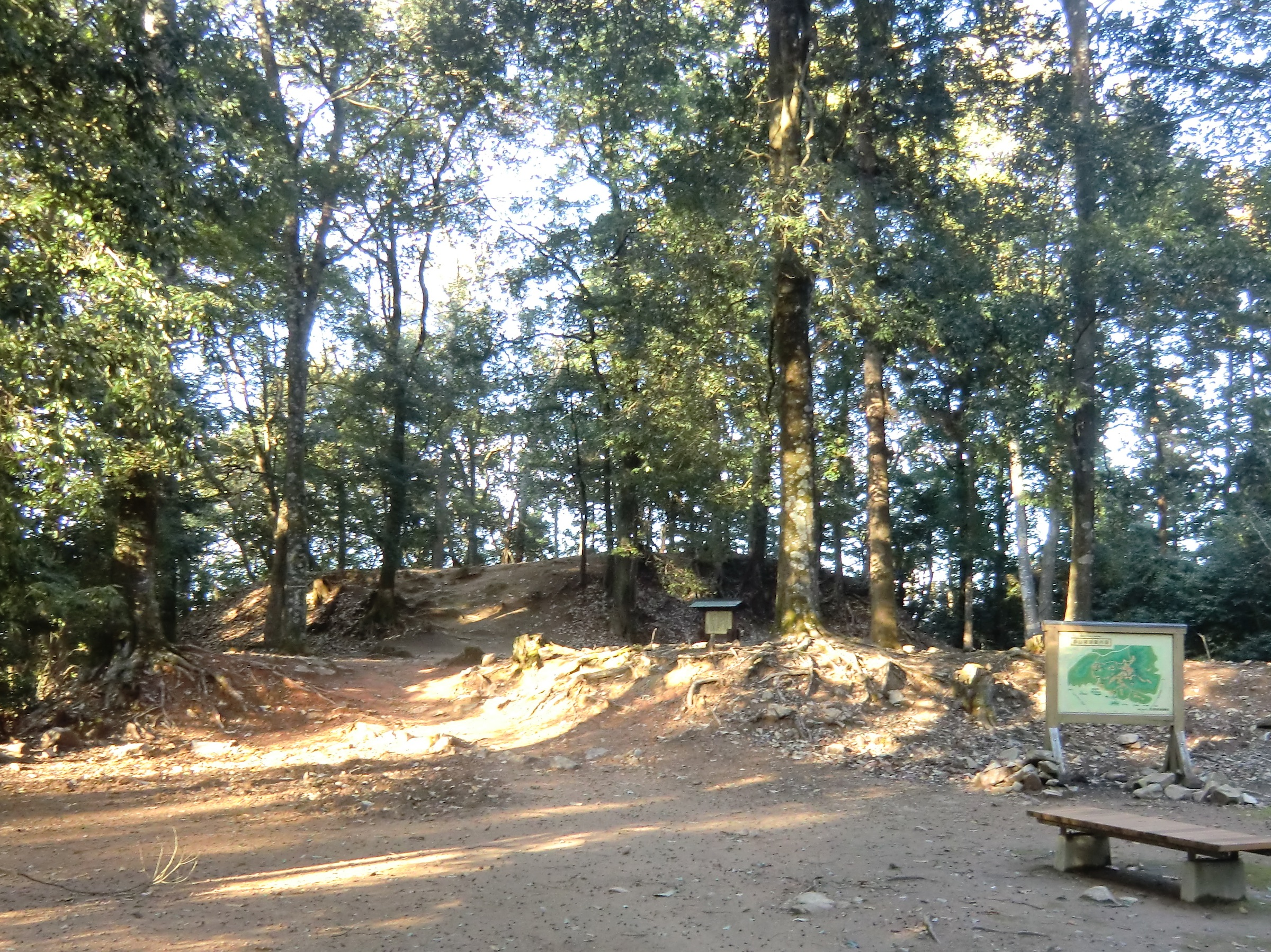 吉田郡山城跡の本丸周辺（安芸高田市）。画像手前が二の丸、中央が本丸、最奥部が本丸櫓台。